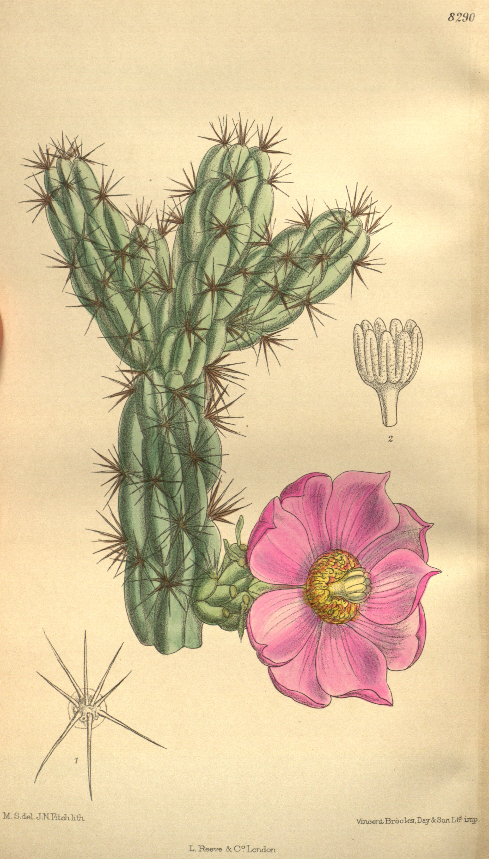 Opuntia imbricata (= Cylindropuntia imbricata), Cactaceae